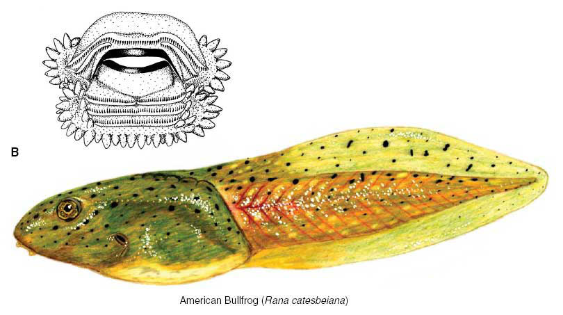 Kaulquappe des Amerikanischen Ochsenfrosches (Rana catesbeiana) und die Mundregion